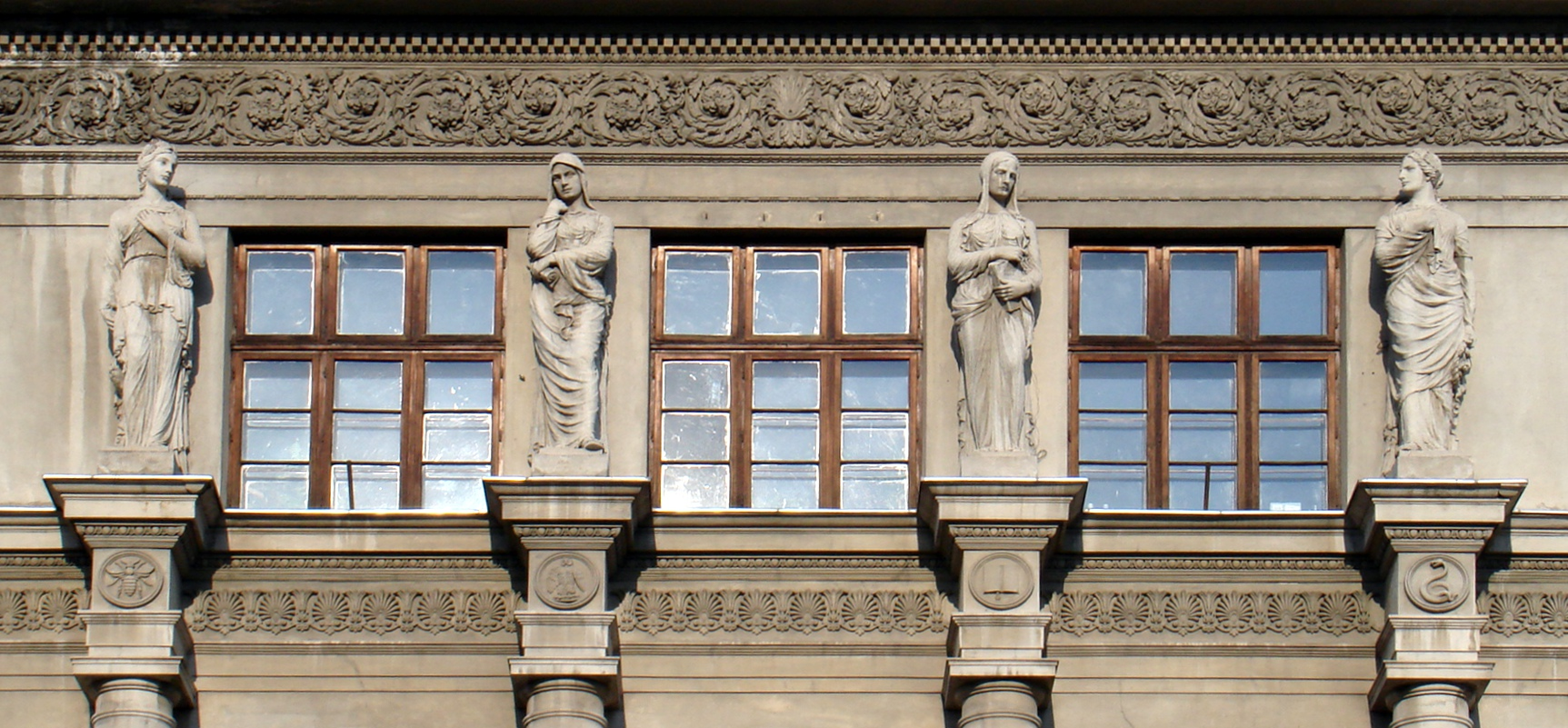 4 Muze - Faţada Universităţii Bucureşti - sculptor Emil Wilhelm Becker